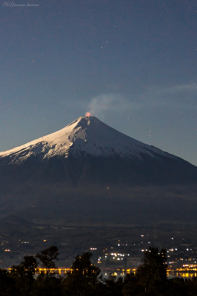 Fotografía de la actividad del volcán Villarrica obtenida desde sector flor del lago, en Mayo de 2016. Imagen con 10 seg de exposición. (Francisco Barrera Martínez)